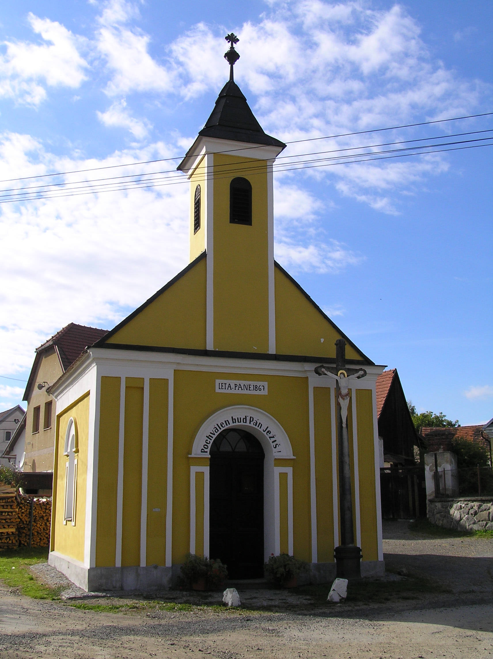 Kaplička v Nišovicích